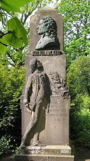 Denkmal Johann Julius Hecker, Theologe und Pädagoge um 1750 Inschrift: Begründer des ersten preußischen Lehrerseminars 1748. Das Denkmal steht auf der Schlossinsel in Berlin-Köpenick. Selbst fotografiert, Mai 2004 GNU FDL